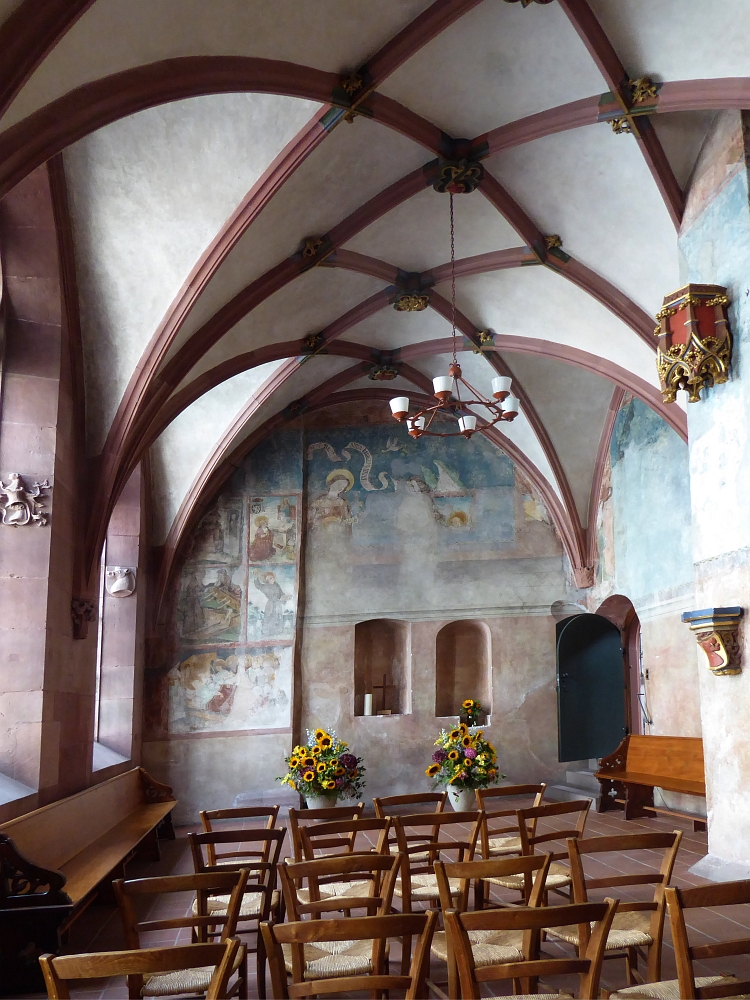 Kapelle in der Peterskirche. Die Kirche ist ein Sakralbau in der Schweizer Stadt Basel. Sie ist dem heiligen Petrus geweiht und dient nach Umnutzungen und Erneuerungen seit 1529 als evangelisch-reformierte Kirche.